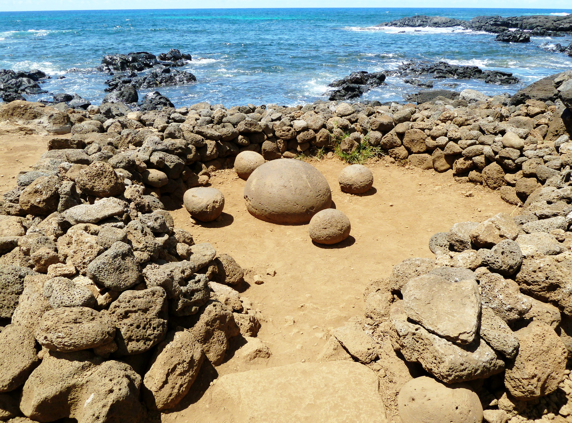 Ahu te pito Kura - Centro ceremonial "Ombligo de Luz" - Chile